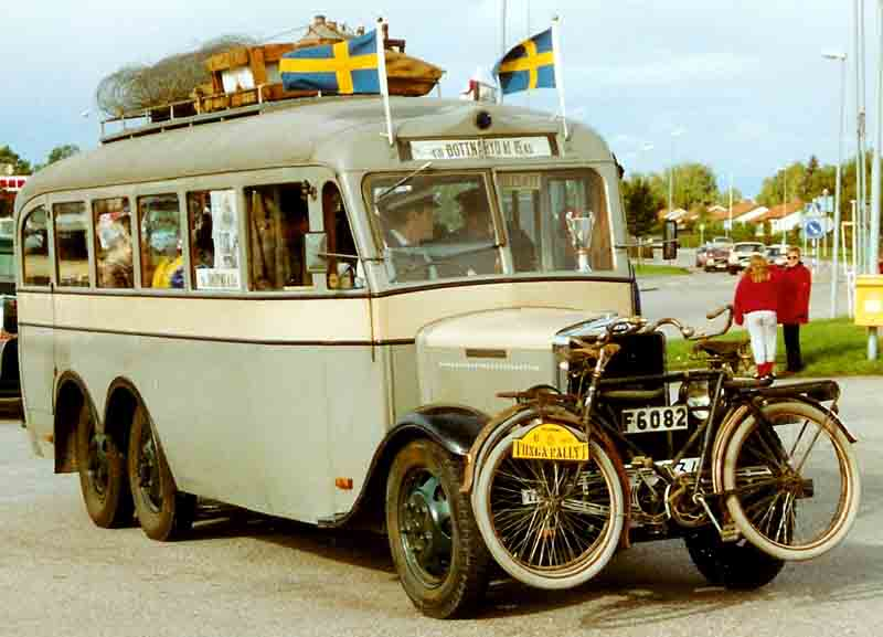 Volvo LV72DS Bus 1935.